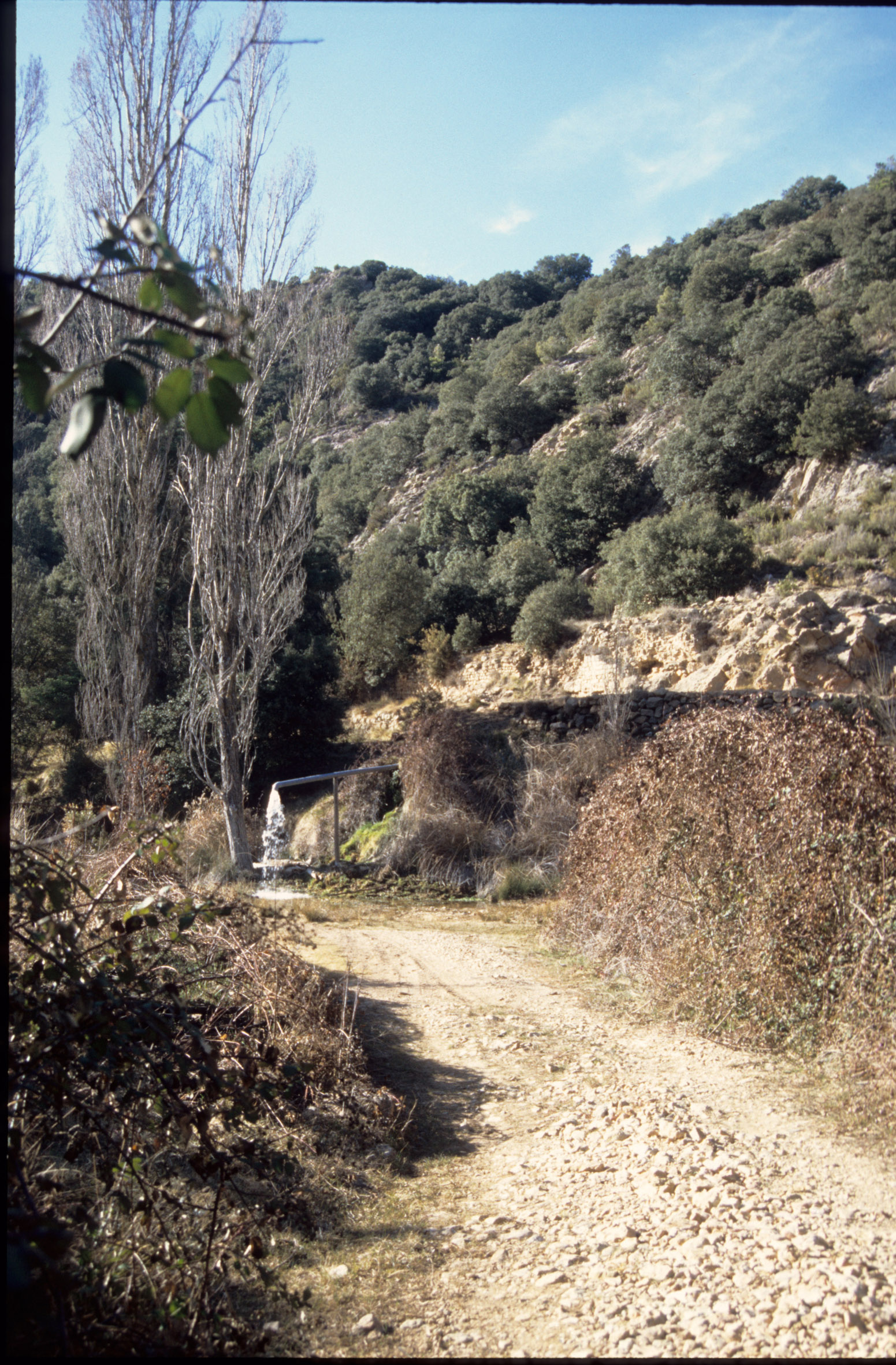 Gavarra (Alt Urgell), la Font d'Isot, sota les ruïnes de l'antic convent hospitaler, 1999.